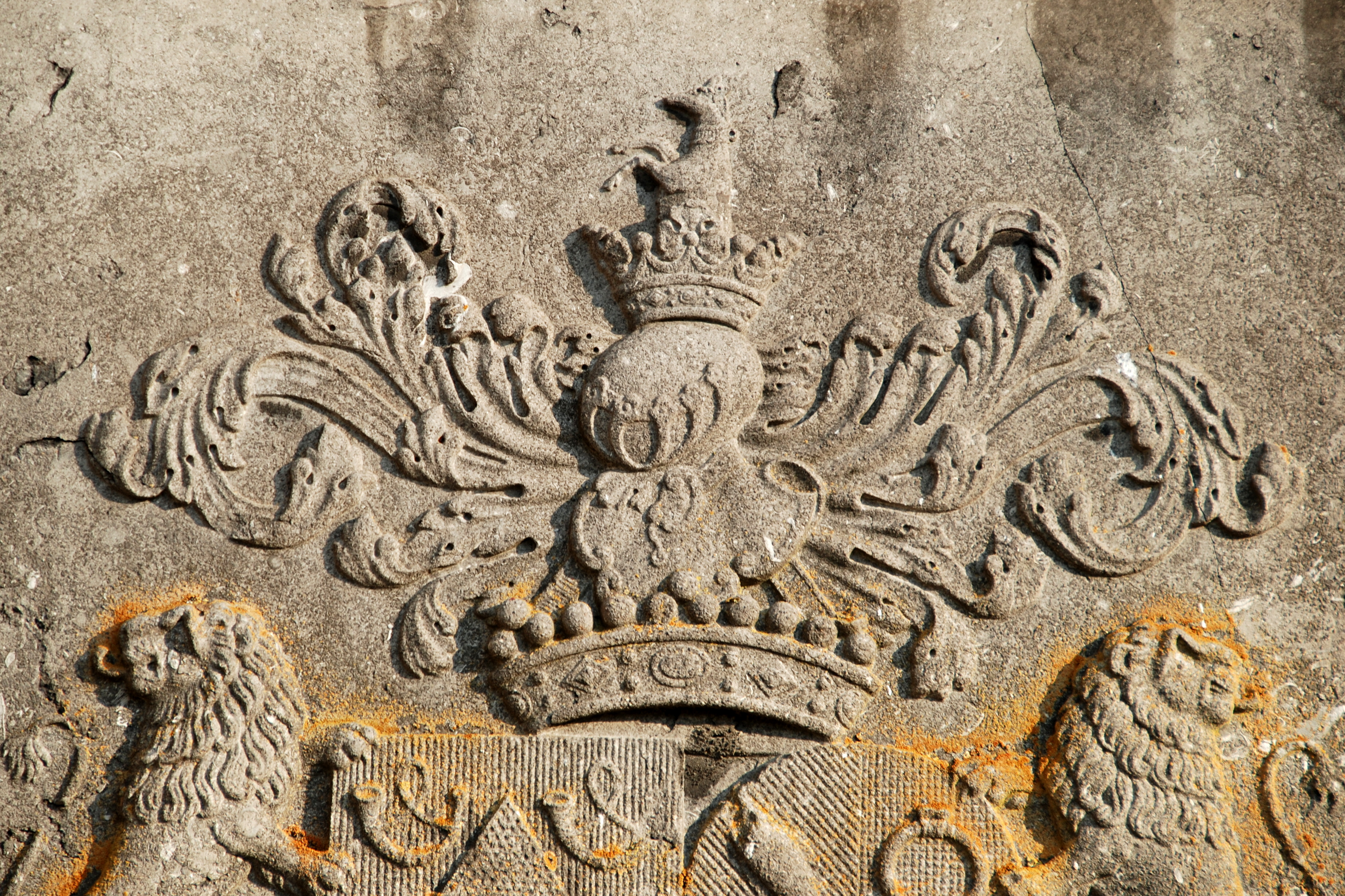 Belgique - Brabant wallon - Église Saint-Martin de Ways - Dalle funéraire du comte Cornet d'Elzius